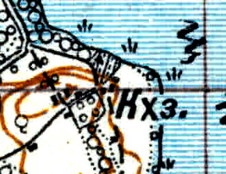 Топографическая карта Ленинградской области, квадрат Vc-29 (Батецкая), деревня Красный Октябрь